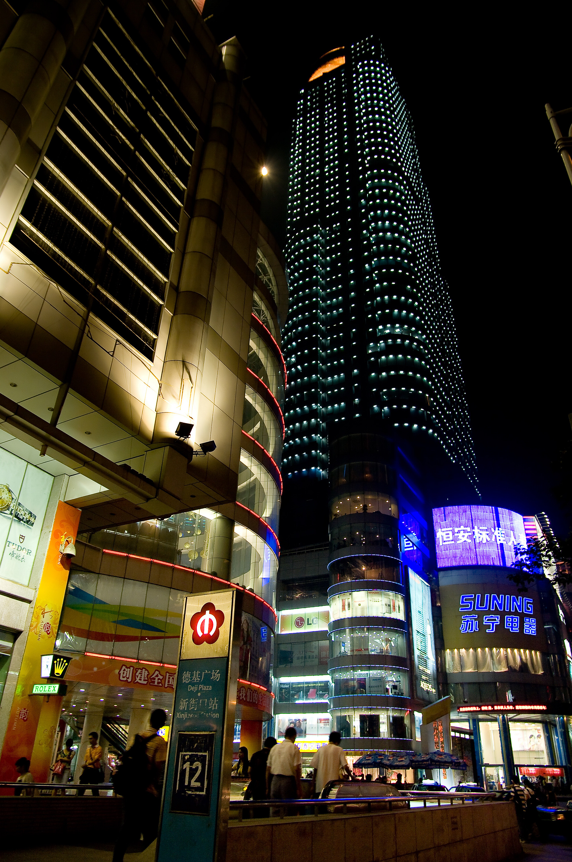 Xinjiekou night view, Nanjing